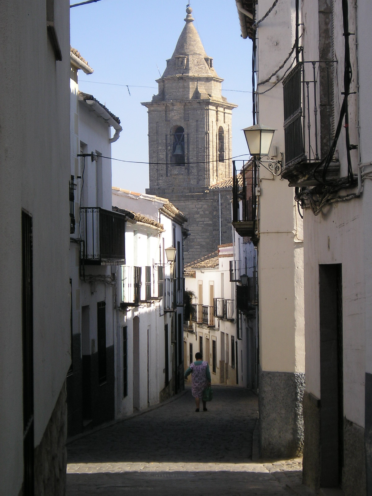 Bajando a la Parroquia de Sabiote